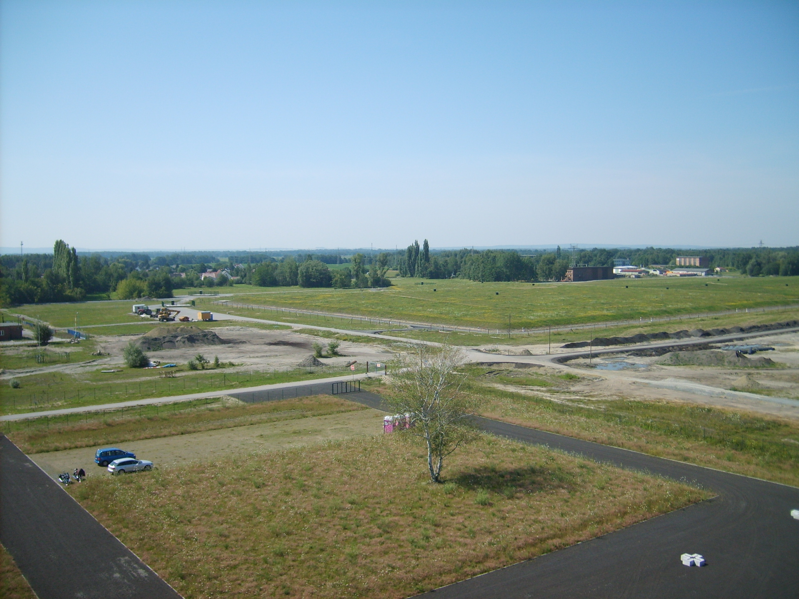 Blick über das einstige Kokerei-Gelände von den Biotürmen in Lauchhammer.